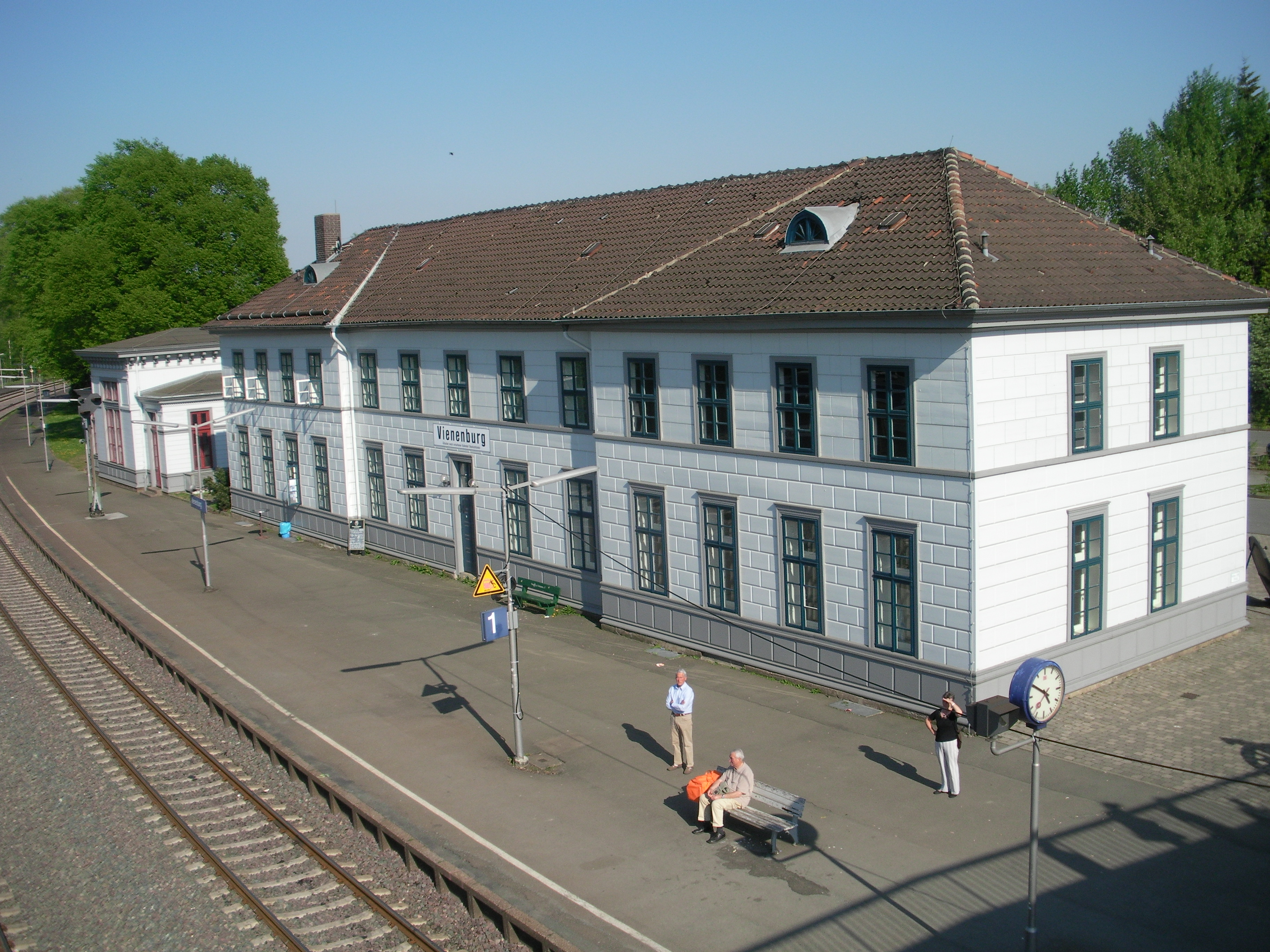 Bahnhof Vienenburg